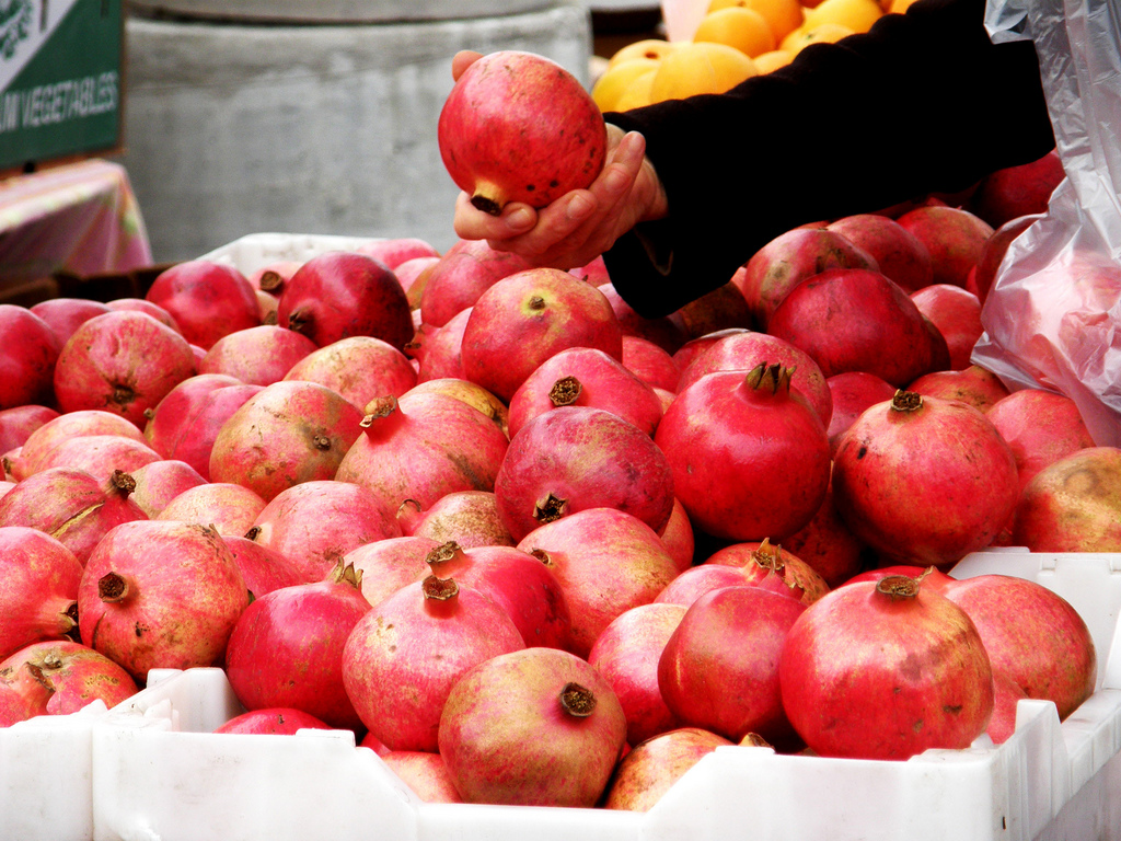 Menlo Park